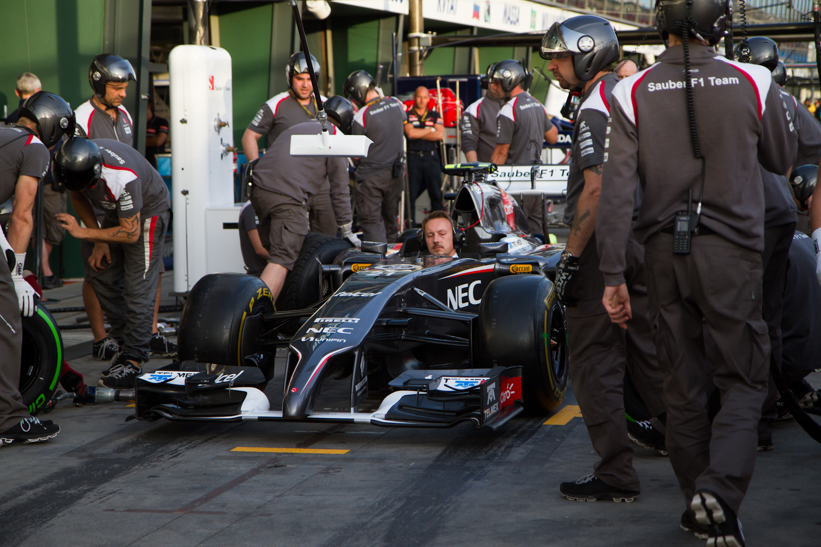 Sauber C33 i depån